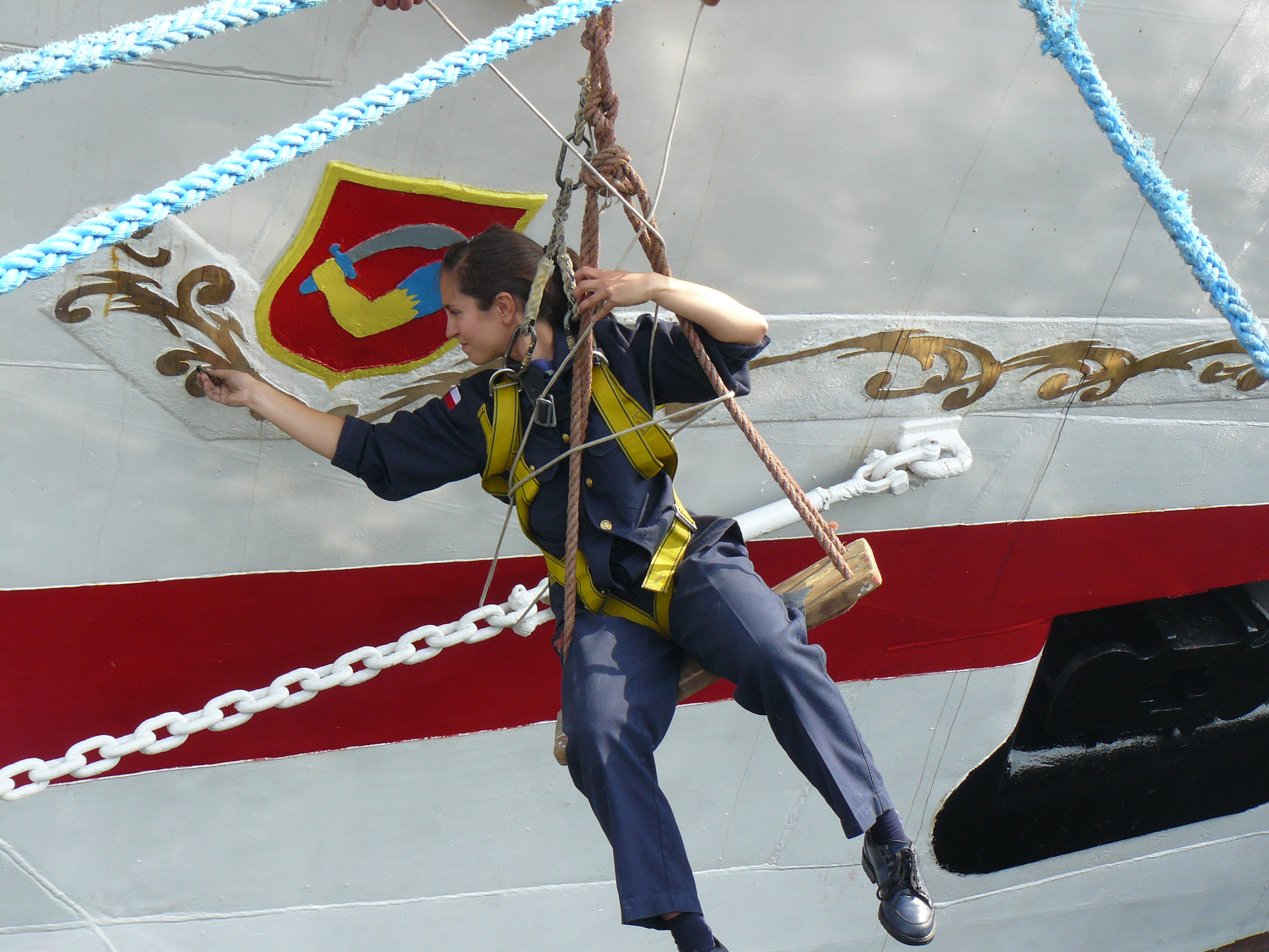 Pani podchorąży na ławce bosmańskiej czyści girlandy.